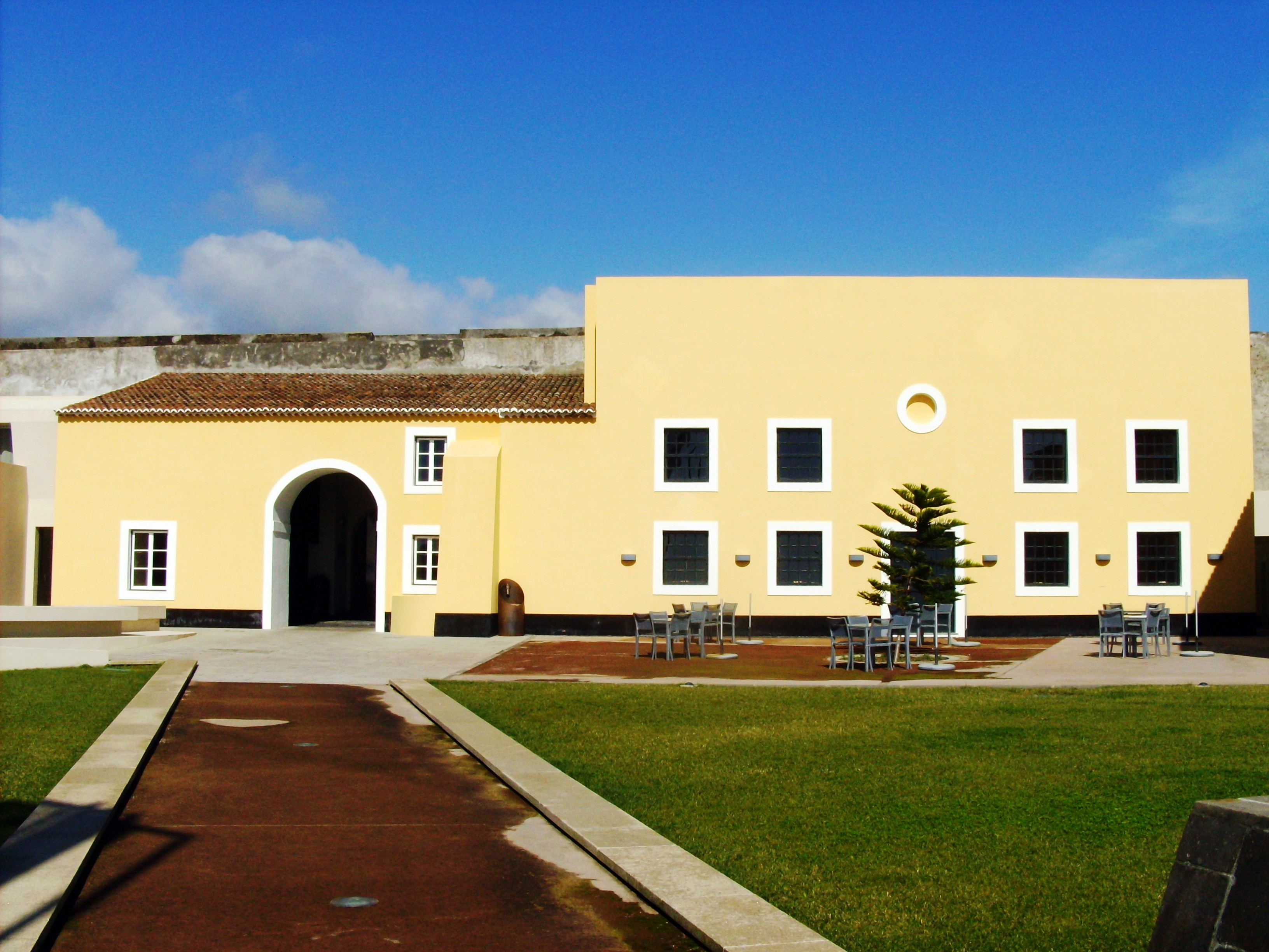 Forte de São Sebastião, freguesia de Nossa Senhora da Conceição, cidade e concelho de Angra do Heroísmo, ilha Terceira, Açores: vista interna do portão.